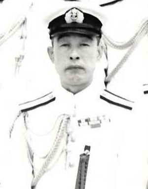 小林謙五海軍中将